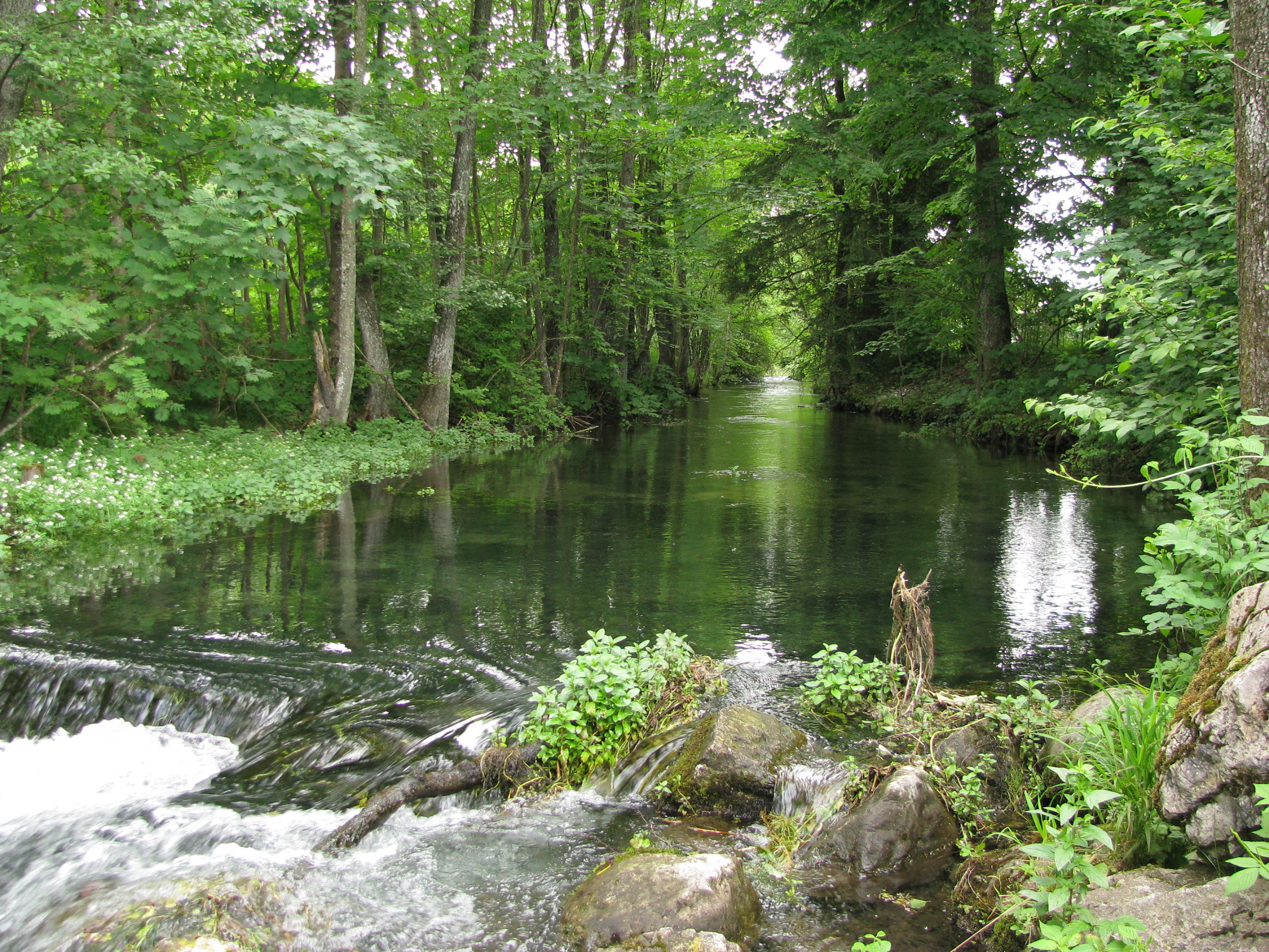 Ellbach in Bad Tölz